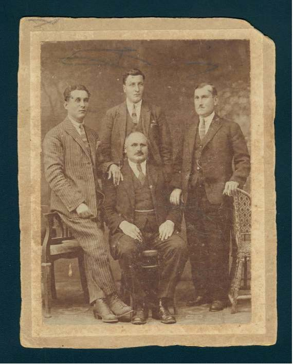 Слави Алексиев, Стефан Боздуганов и...